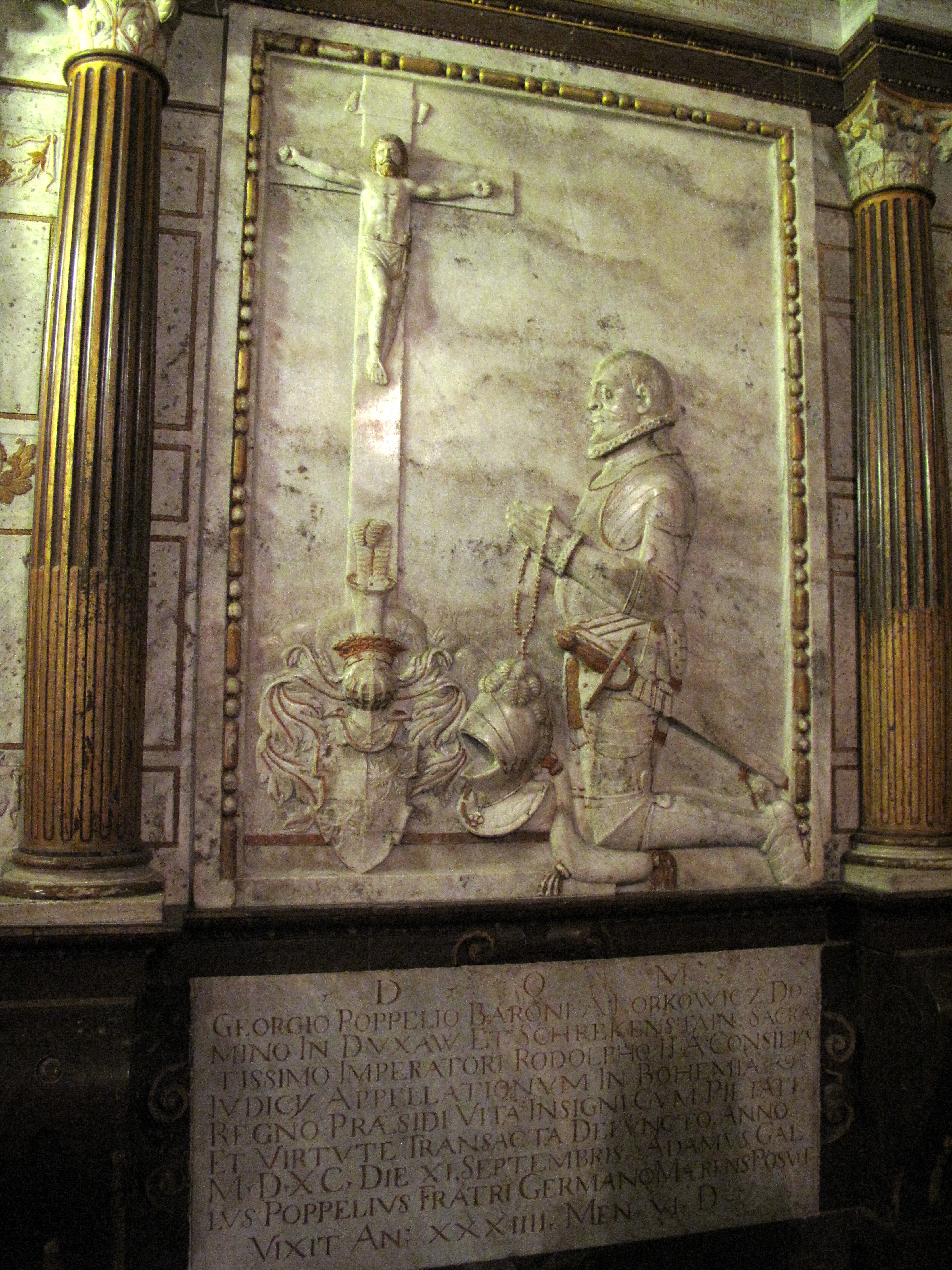 Chrám svatého Víta. Náhrobník Jiřího Popela z Lobkowicz. Přepis textu: D. O. M. // GEORGIO POPPELIO BARONI A LOBKOWICZ DO // MINO IN DVXAW ET SCHREKENSTAIN SACRA // TISSIMO IMPERATORI RODOLPHO II A CONSILYS // IVDICY APPELLATIONVM IN BOHEMIA // REGNO PRAESIDI VITA INSIGNI CVM PIETATI // ET VIRTVTE TRANSACTA DEFVNCTO ANNO // M. D. XC. DIE XI. SEPTEMBRIS. ADAMVS GAL // LVS POPPELIVS FRATRI GERMANO MARENS POSVIT // VIXIT AN: XXXIIII. MEN. VI. D.